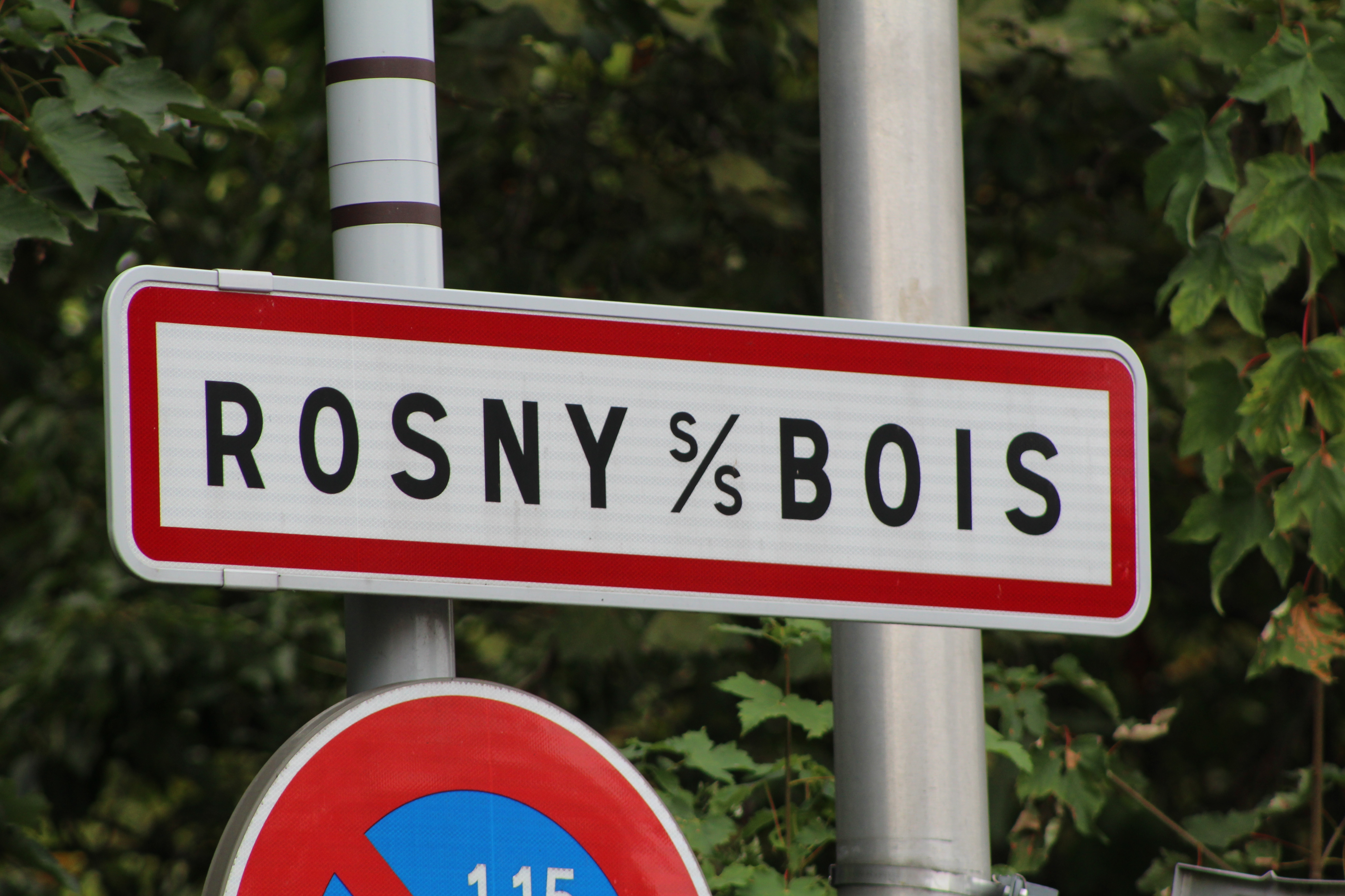 Panneau d'entrée dans Rosny-sous-Bois depuis Neuilly-Plaisance (vers l'église Notre-Dame de l'Assomption).